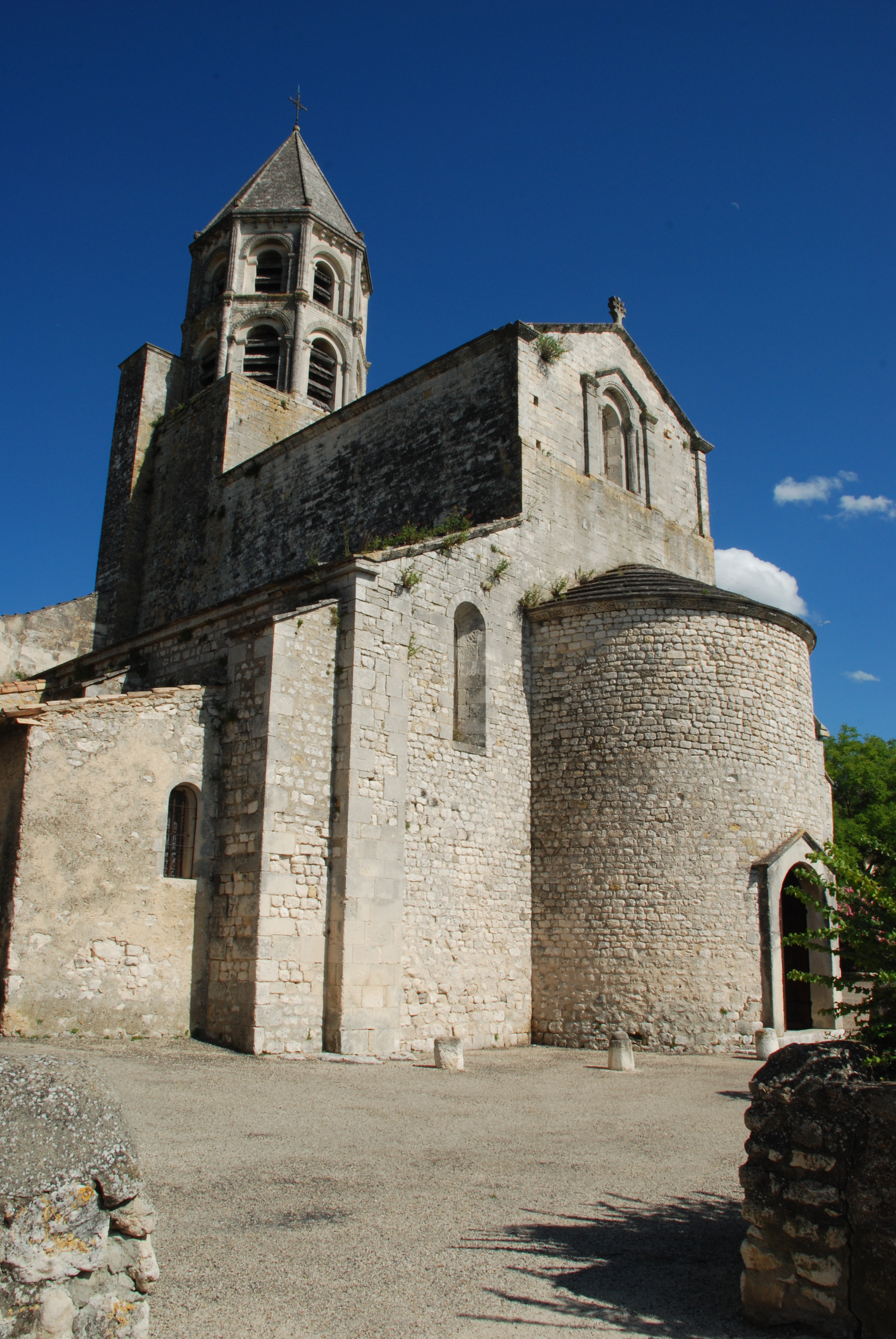 France - Drôme - La Garde-Adhémar - Église Saint-Michel